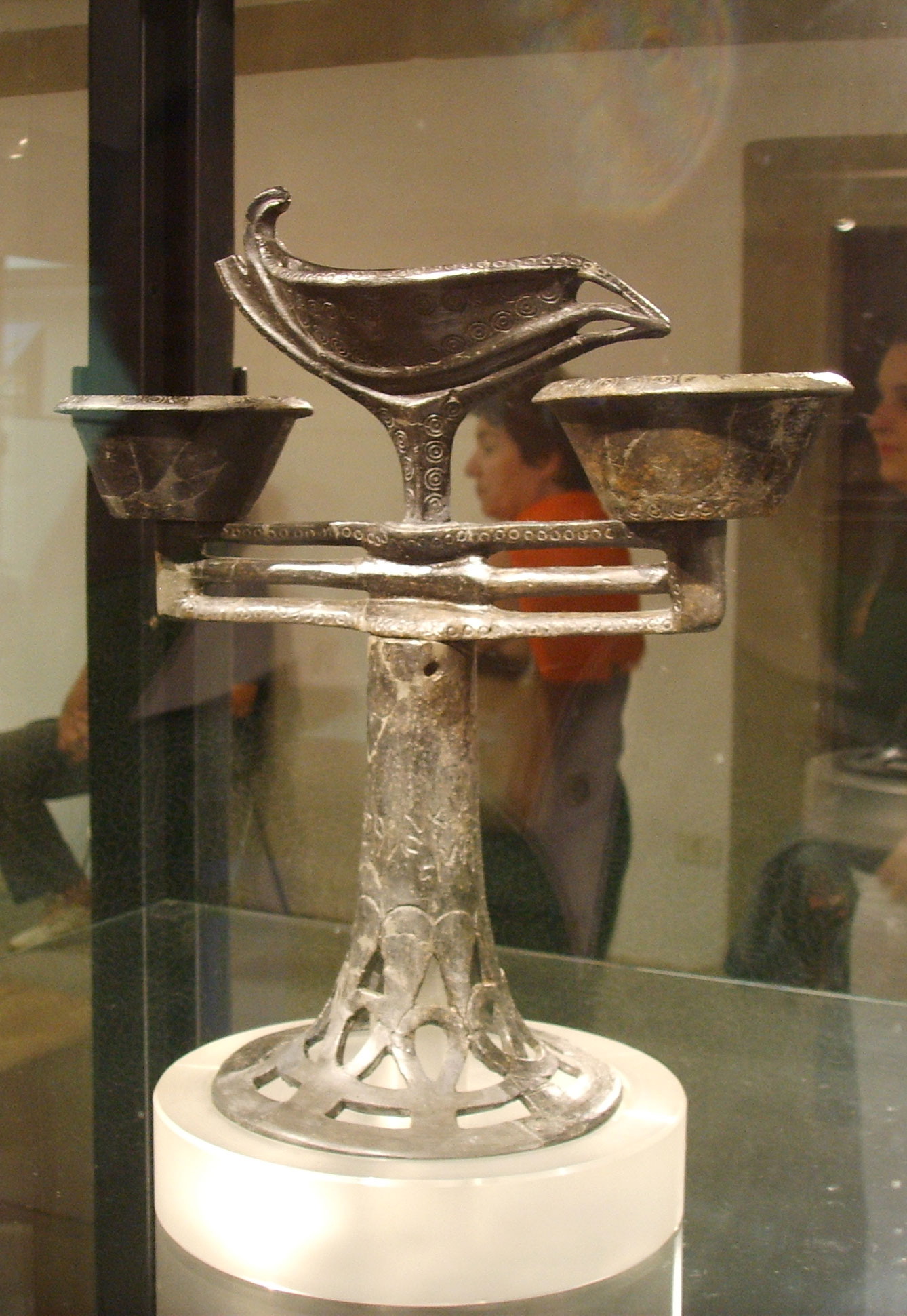 Museo Archeologico di Artimino Province of Prato, Tuscany, italy